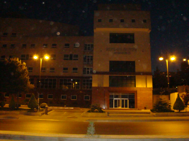 Bakının Yasamal rayonundakı Mətbuat prospektində Heydər Əliyev mərkəzi